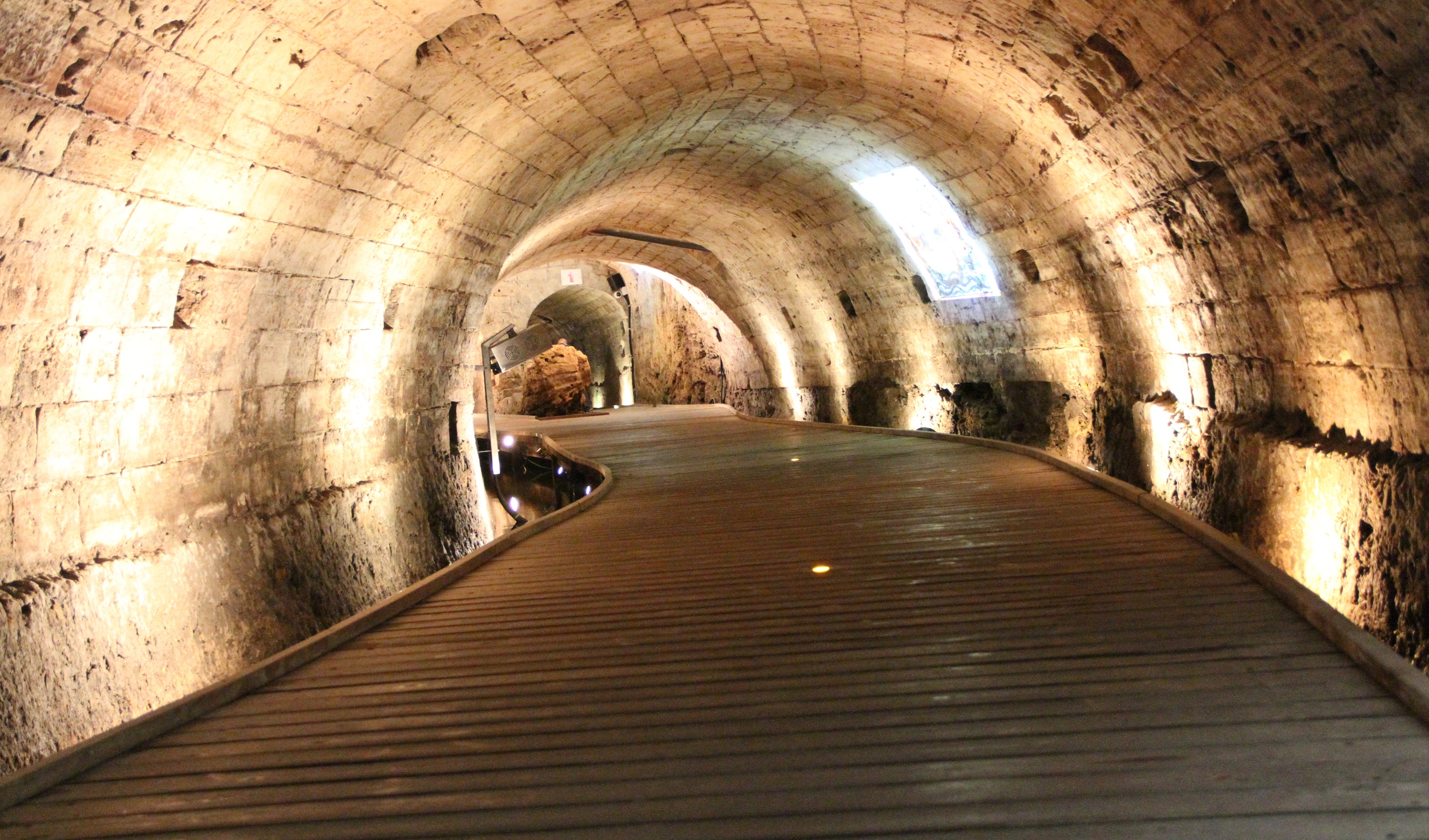 Acre